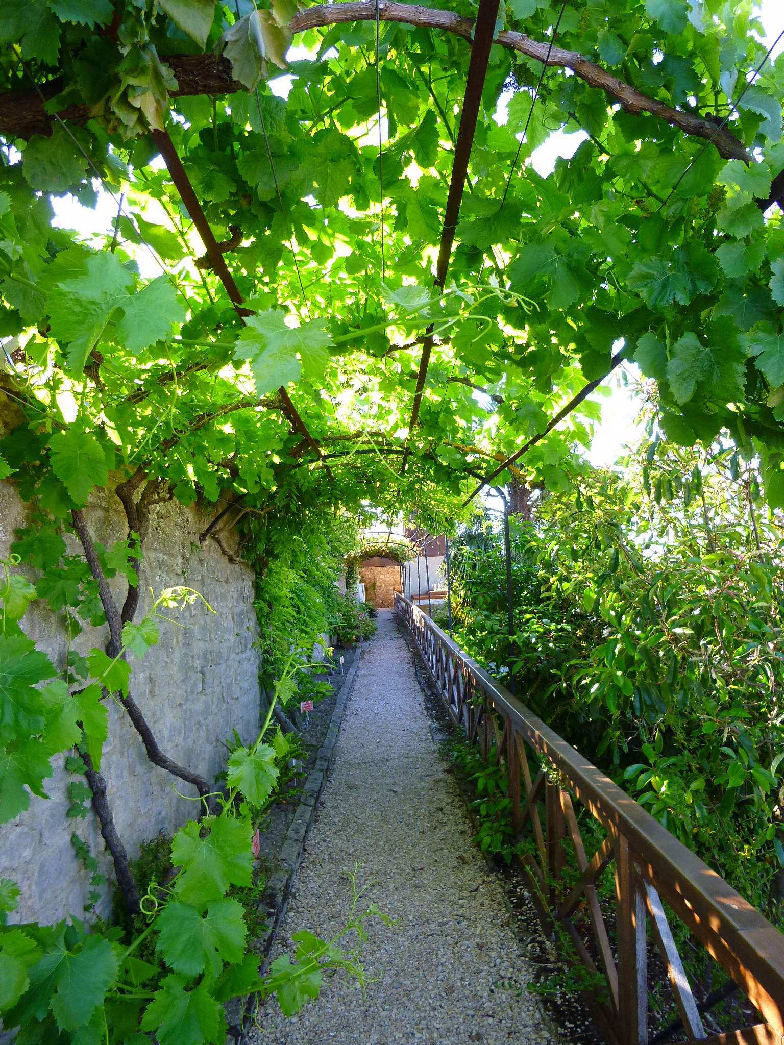 Miranda de Ebro - Centro de Interpretación de la Miranda Antigua (CIMA), Jardín Botánico